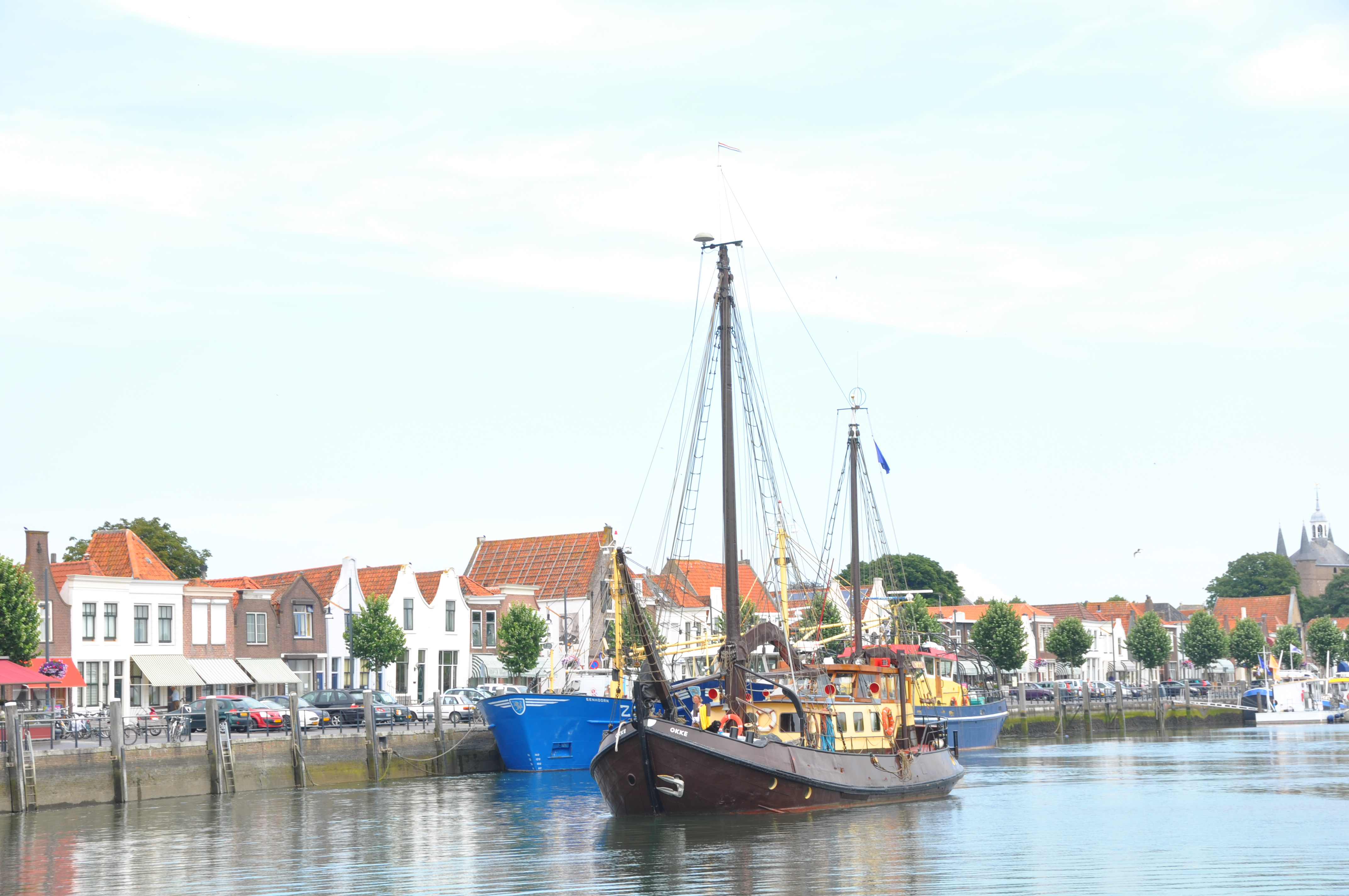 De OKKE in de haven van Zierikzee.